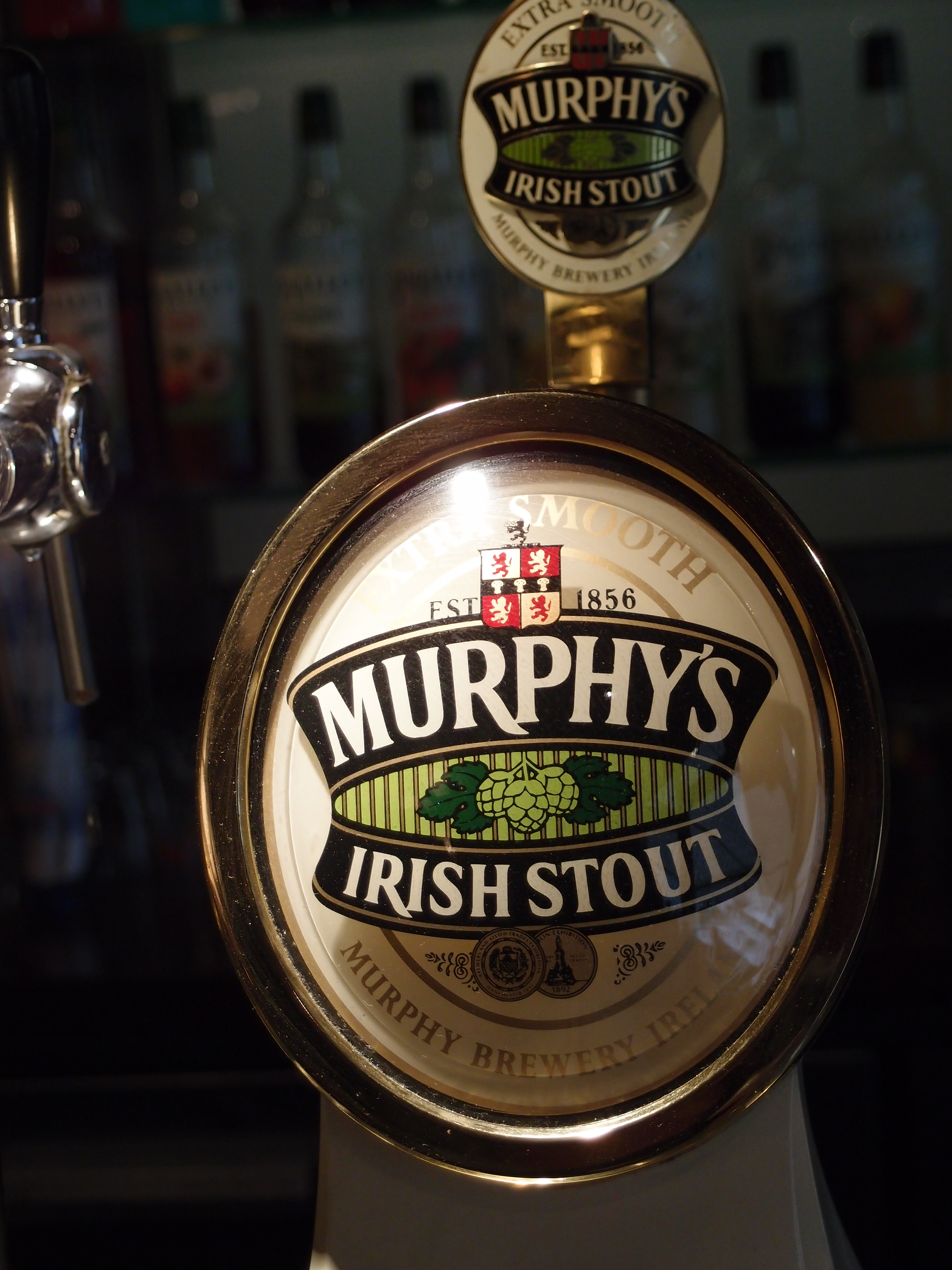 Zapfhahn der irischen Brauerei Murphy`s Datum: 13.09.2012 Urheber: M. Pfeiffer alias Benutzer:Gordito1869 Quelle: privates Fotoarchiv des Urhebers